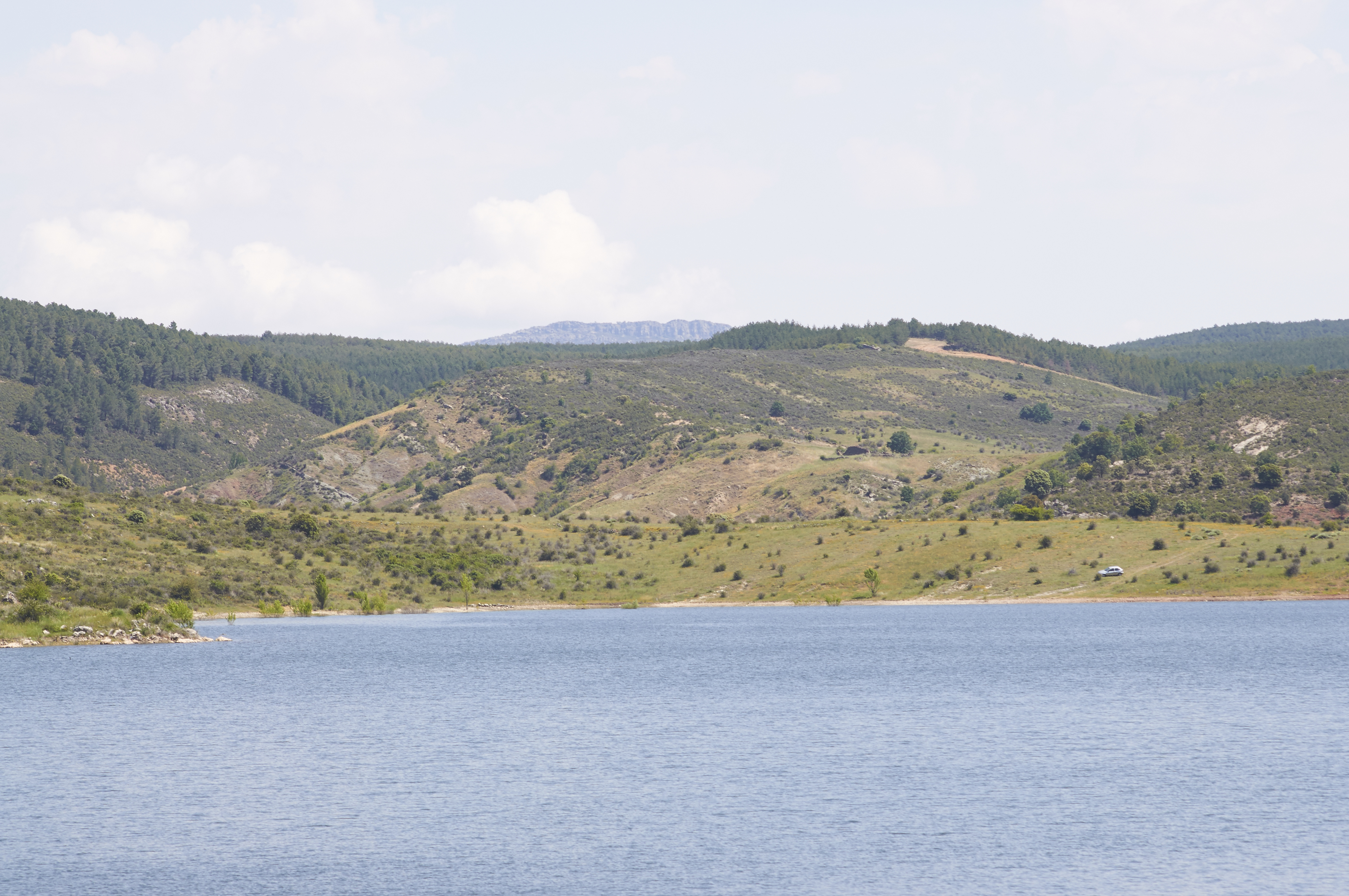 Pálmaces - Pantano